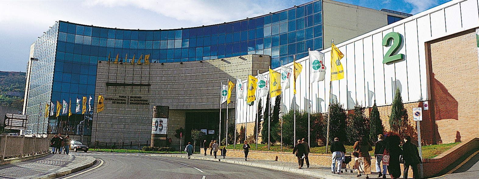 antigua Feria Internacional de Muestras de Bilbao